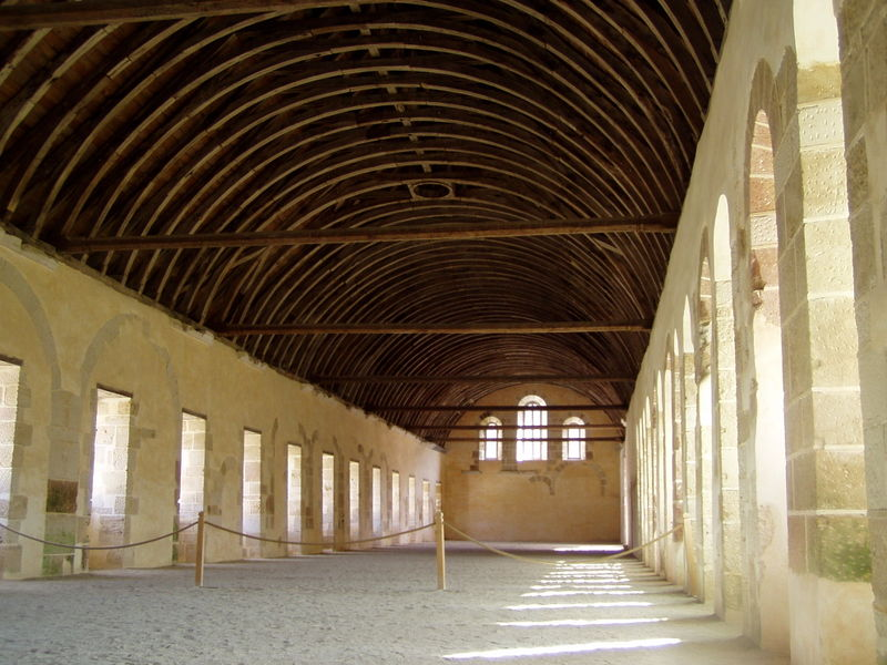 Photo personnelle prise par F.Thurion alias Accrochoc, à l'abbaye de Fontenay le 26 mars 2006.